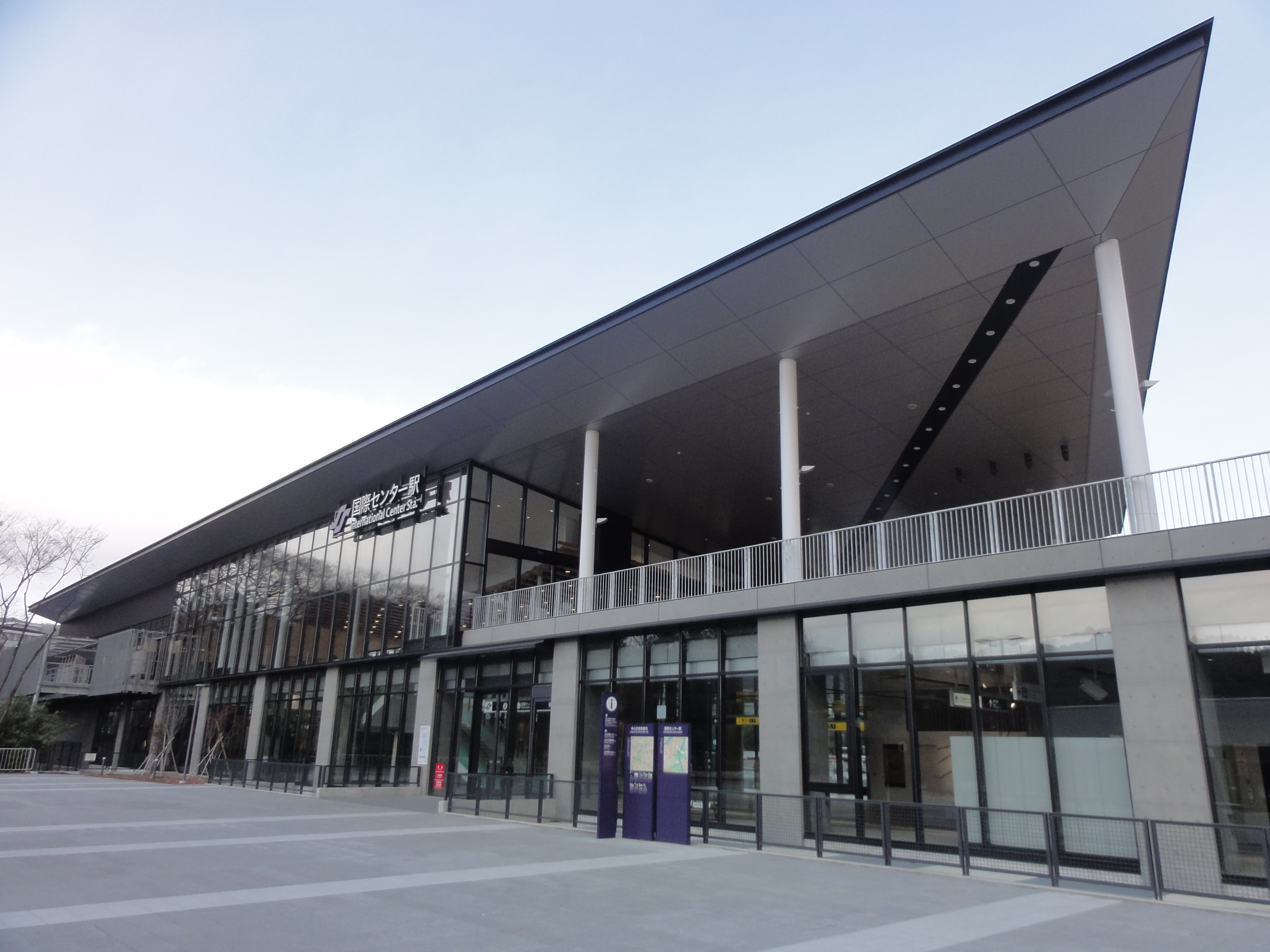 国際センター駅南1出入口